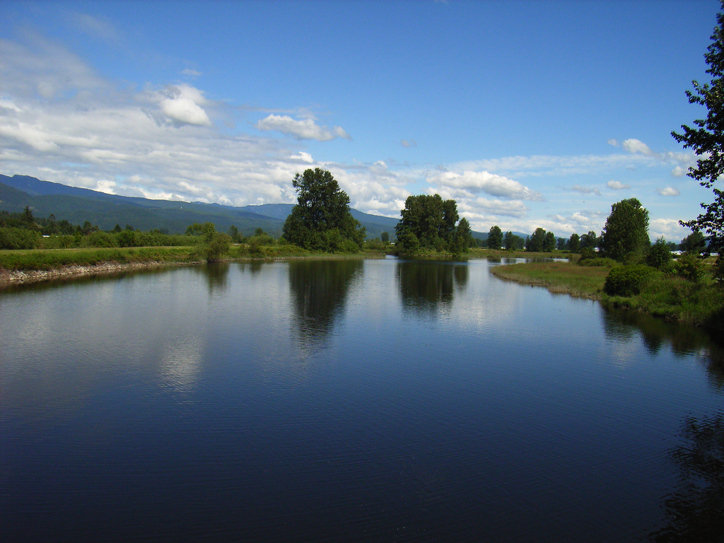 Alouette River